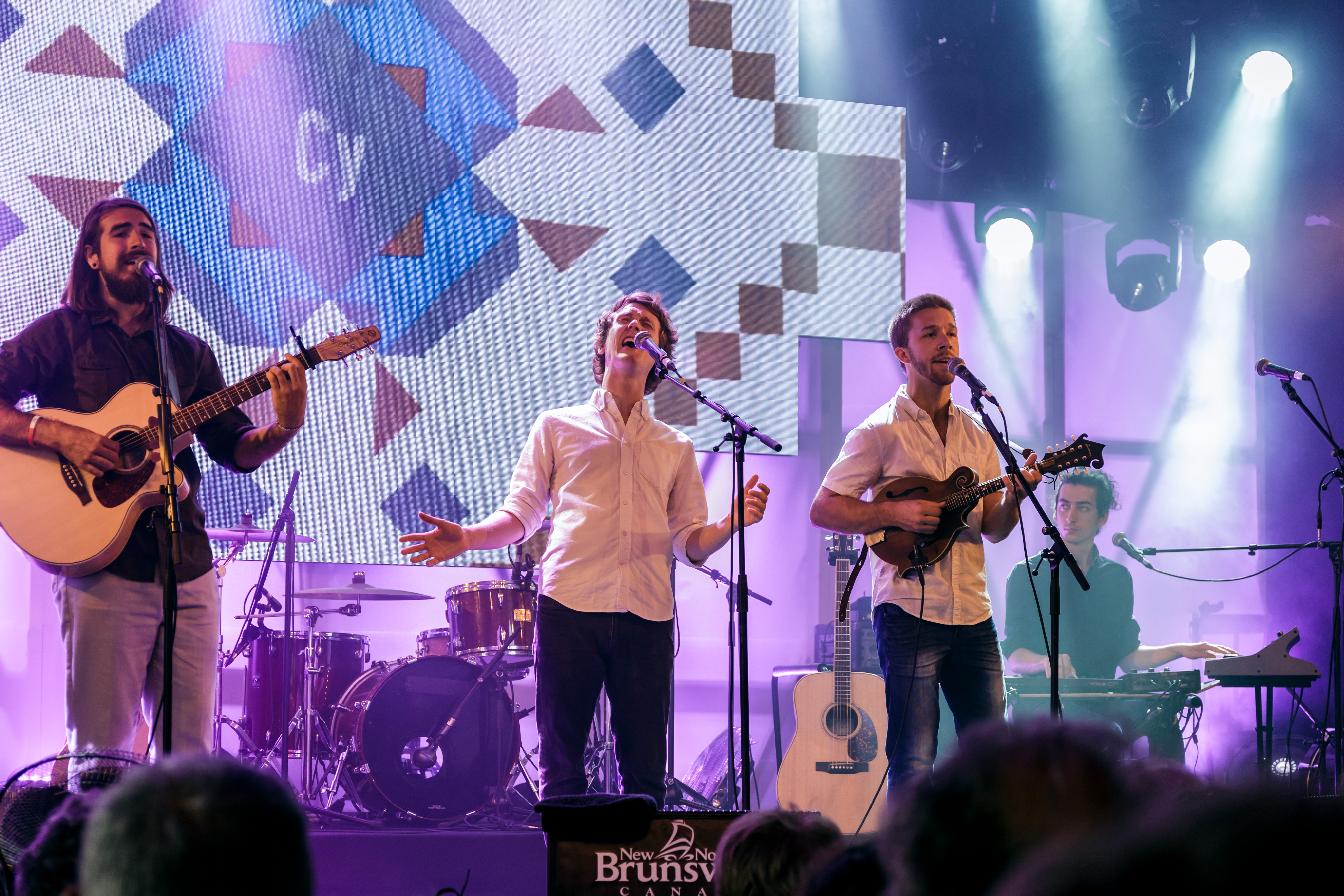 Le groupe Cy au pavillon Expérience Acadie du festival interceltique de Lorient le 6 août 2016.